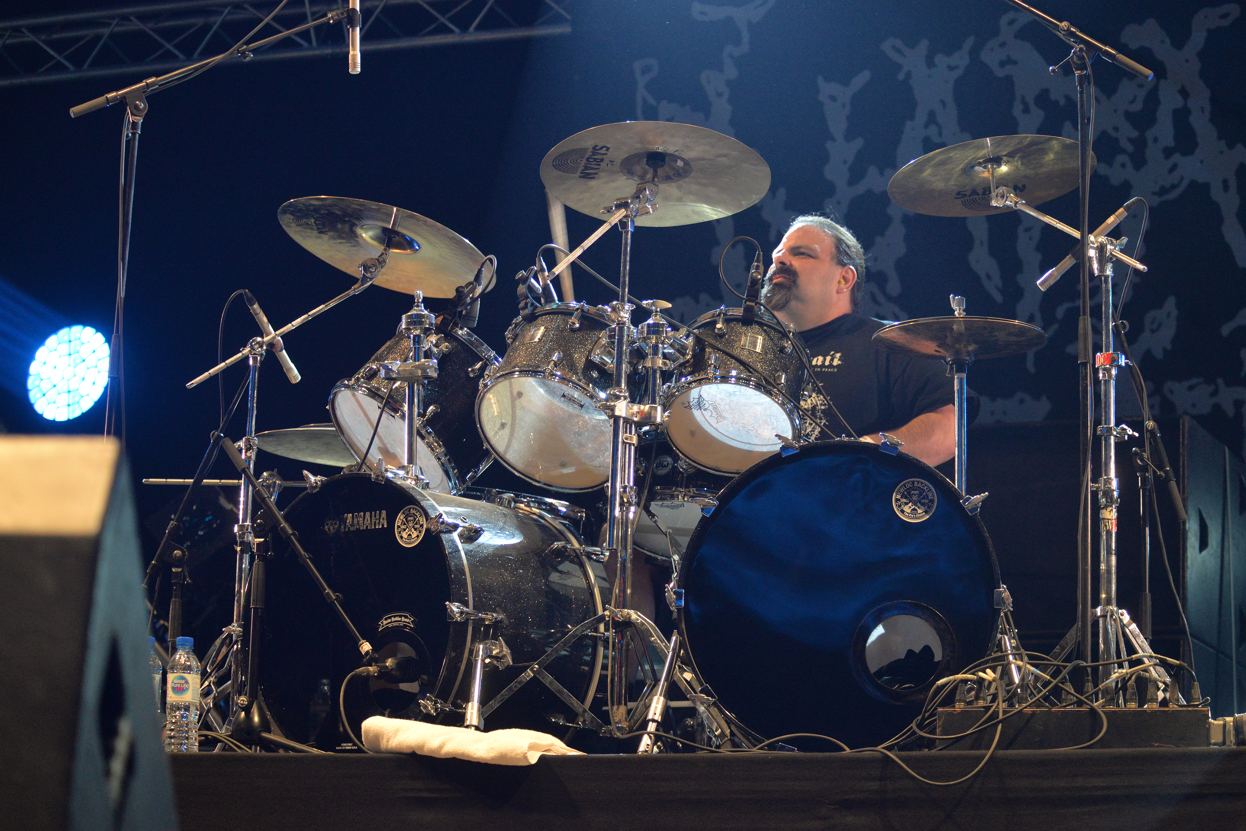 Le groupe anglais Napalm Death sur la scène Altar du Hellfest 2018.